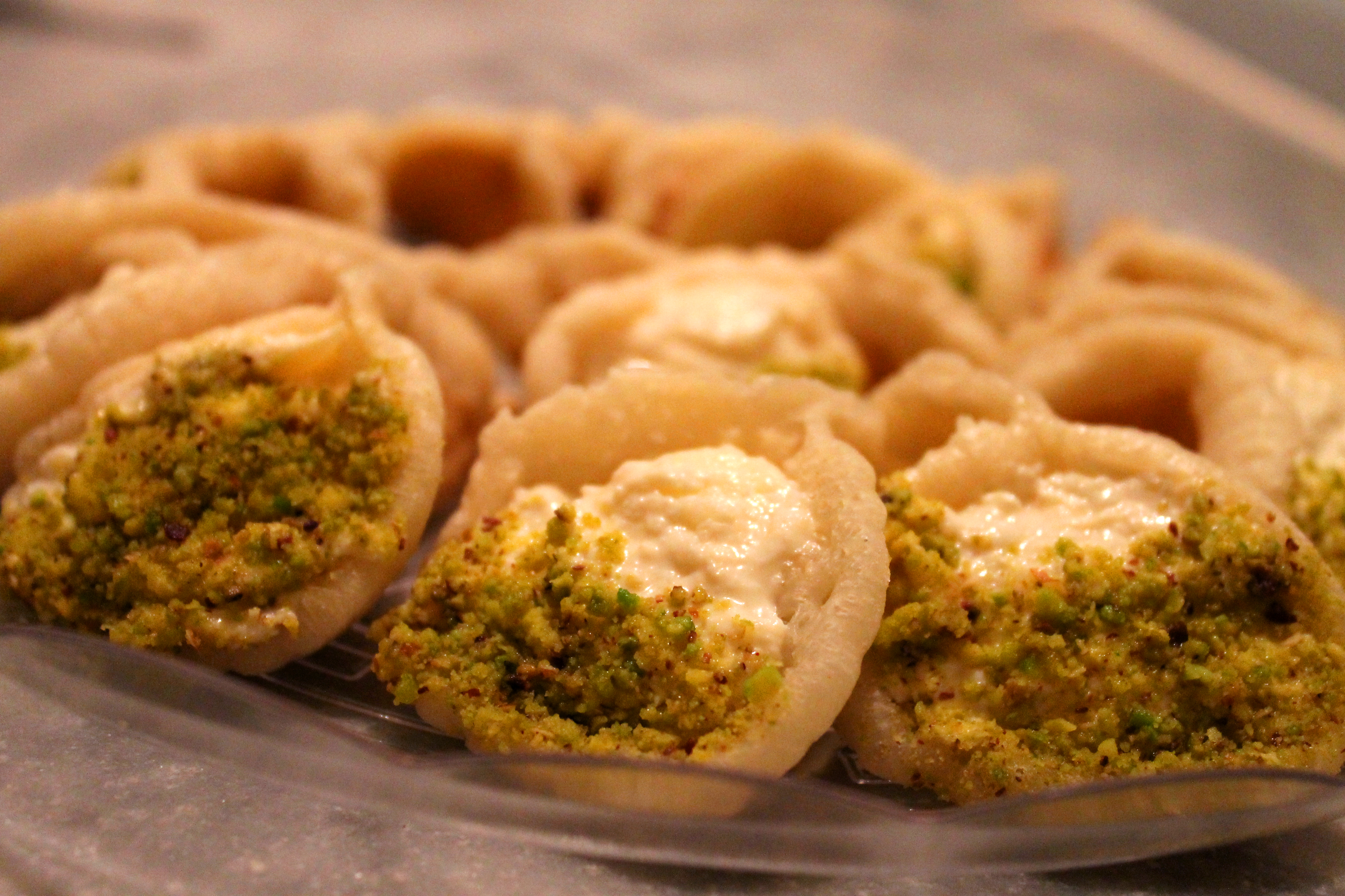 قطايف عصافيري